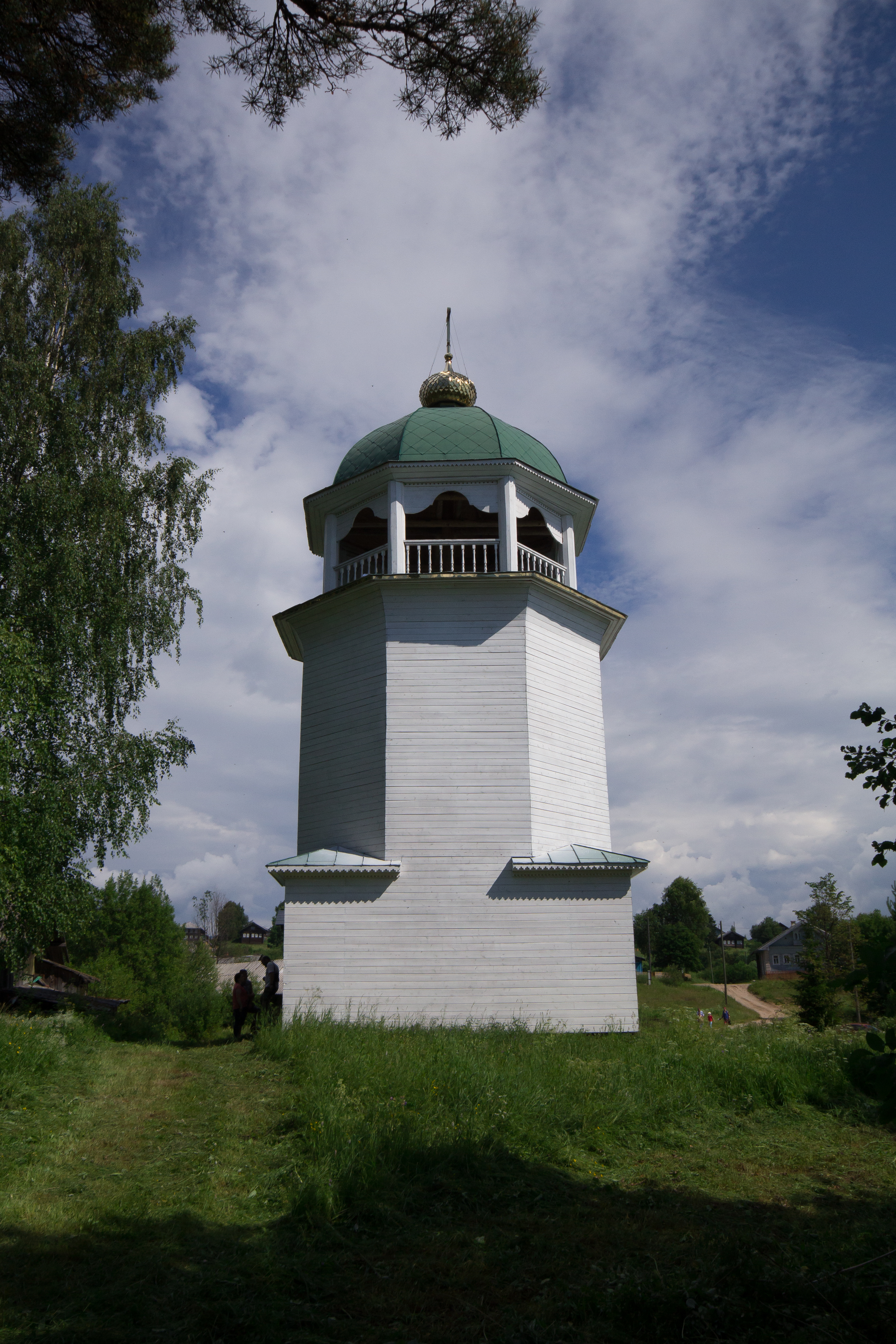 Колокольня: Андричевская, Вельский район, Архангельская область